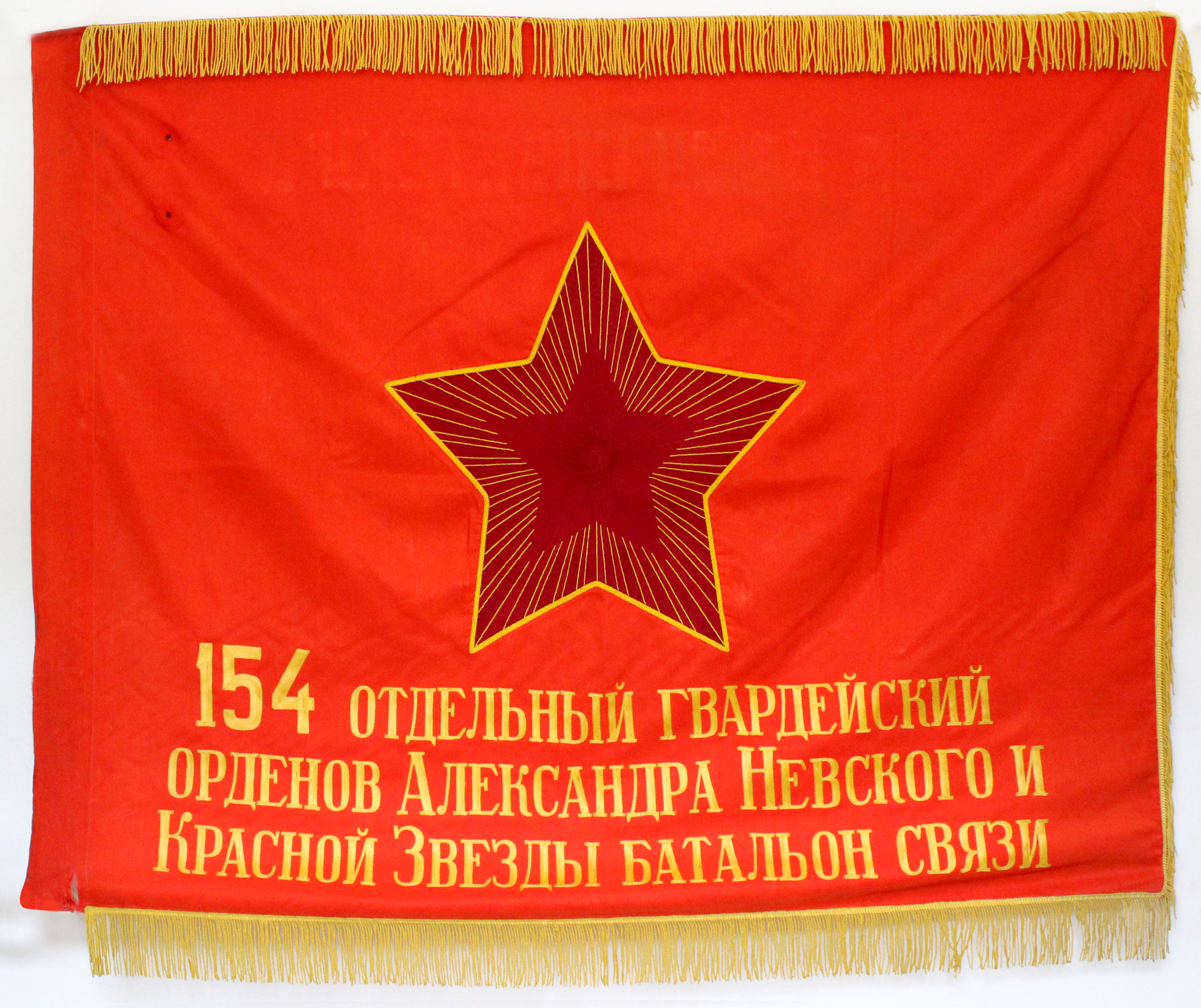 Знамя 154-го отдельного гвардейского батальона связи. Аверс